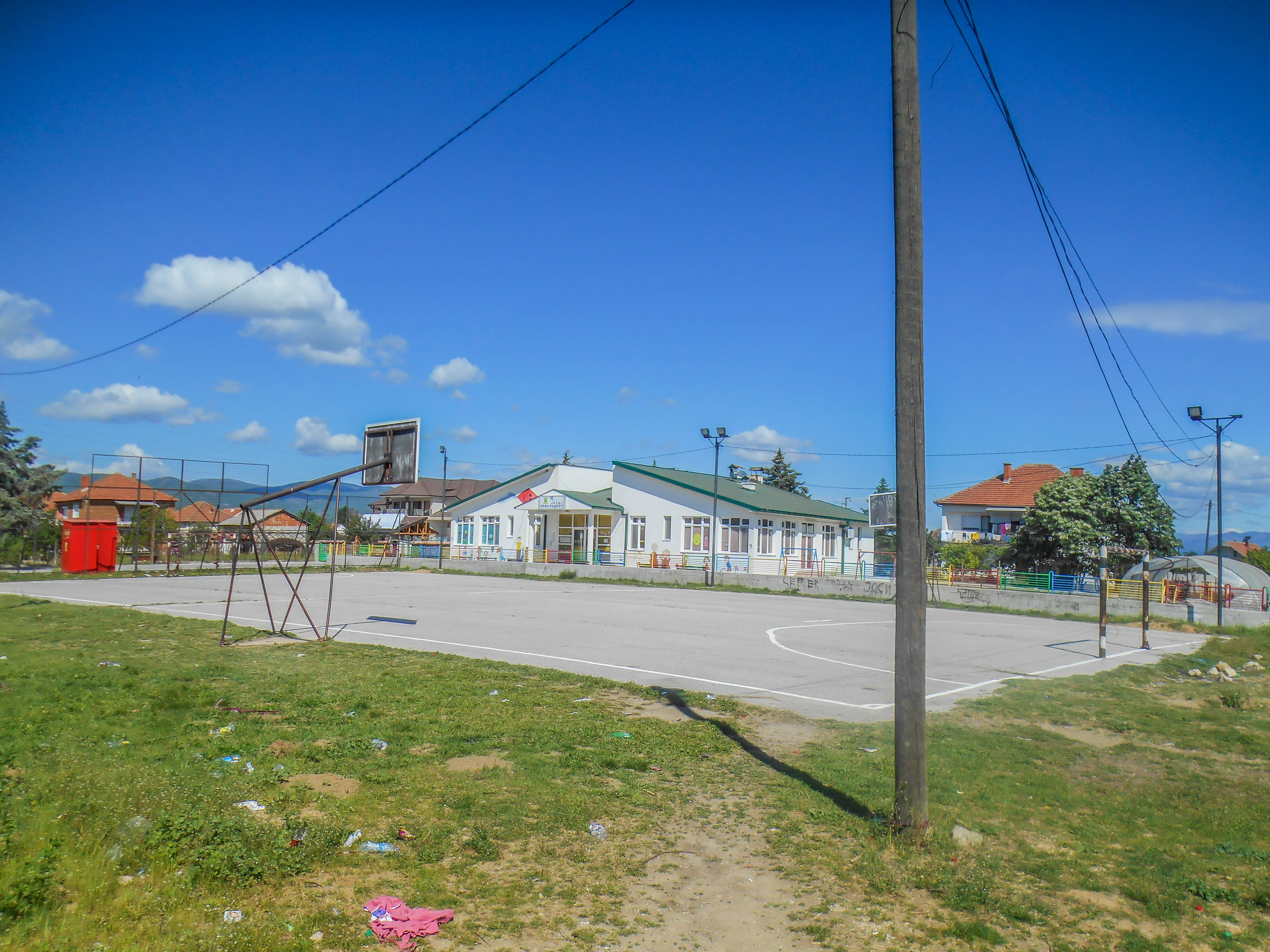 Основно училиште „Гоце Делчев“ - Василево